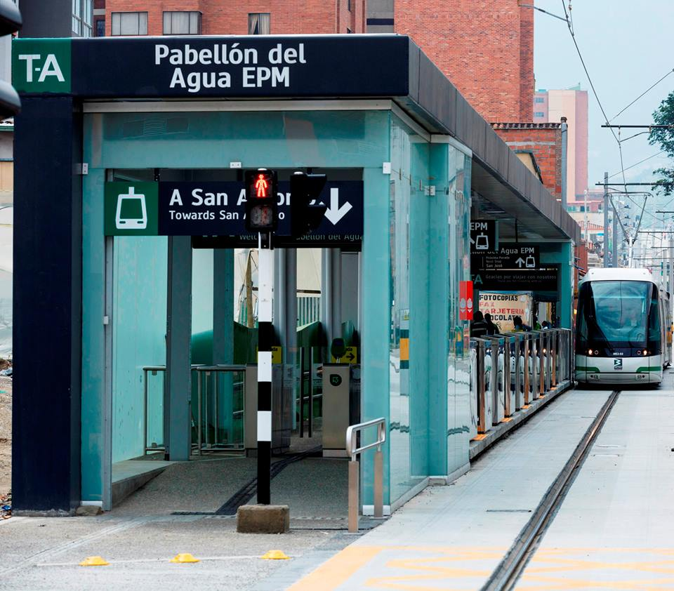 Estación Pabellón del Agua EPM